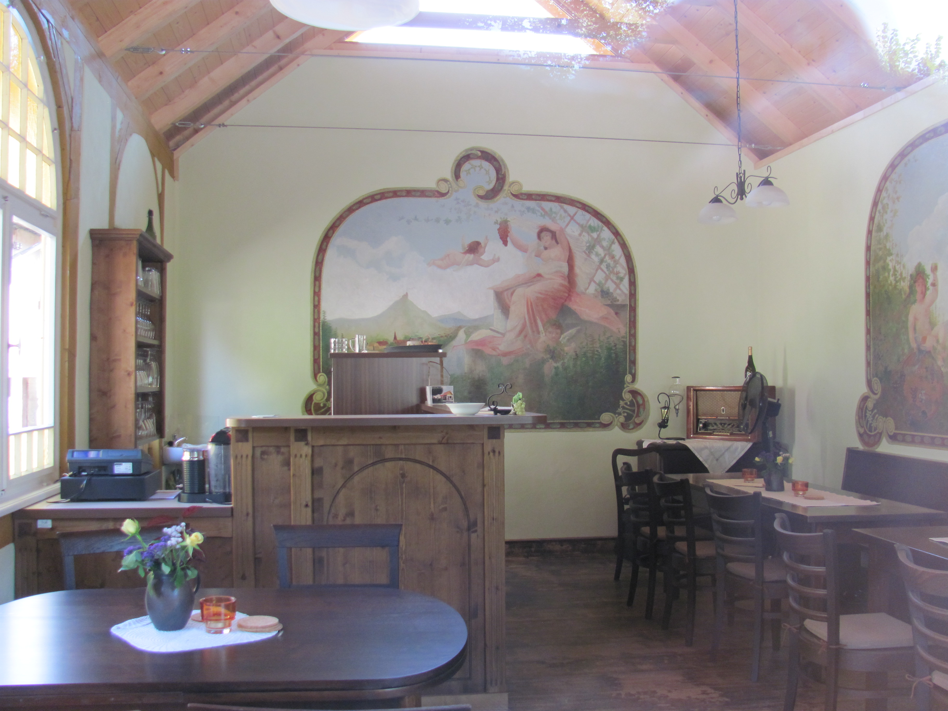 Radebeul-Naundorf Trinkbude